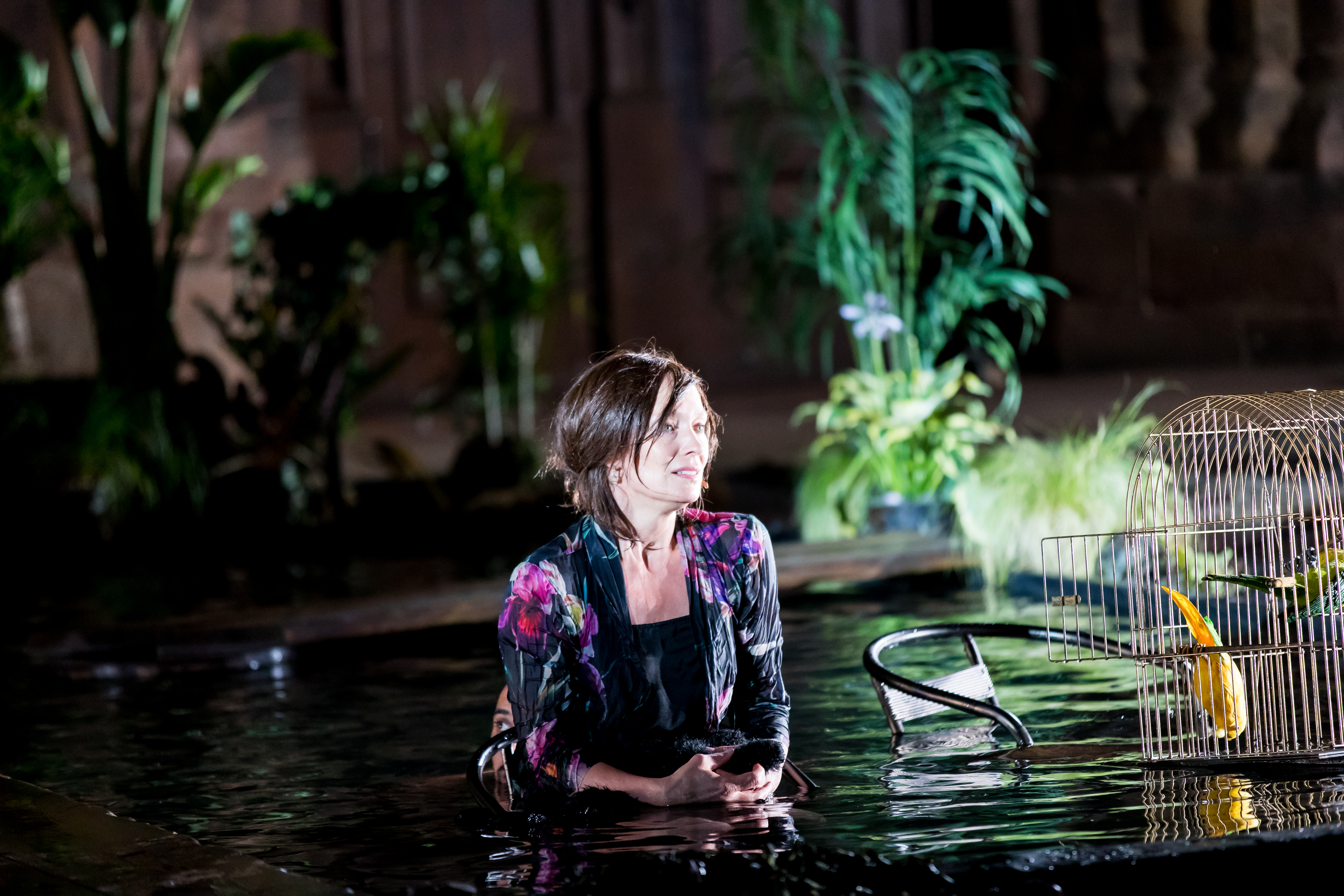 2016: Uraufführung: "GOLD. Der Film der Nibelungen" Regie: Nuran David Calis Autor: Albert Ostermaier Intendant: Nico Hofmann --- Ensemble: Produzent Konstantin Trauer: Uwe Ochsenknecht Regisseur Arsenij Kubik: Vladimir Burlakov Drehbuchautor Charlie P. Weide: Josef Ostendorf Society Reporter Peter Scheumer: Dominic Raacke Kamerafrau "the eye": Anna Rot Setdesignerin "set": Joy Maria Bai Assistentin des Produzenten Carmen: Alexandra Kamp Maskenbildnerin Sueyla Blume : Ayse Bosse die Ältere Kriemhild Karina Bergmann: Katja Weitzenböck die Jüngere Kriemhild Simone Gehel: Constanze Wächter die Ältere Brünhild Lotte Jünger: Michaela Steiger die Jüngere Brünhild Nathalie Aurun: Dennenesch Zoudé Siegfried Mohamad Söder: Ismail Deniz Hagen René Inner: Sascha Göpel Gunther Klaus Castel: Maximilian Laprell Bürgermeister Franz Koppoler: Heiner Lauterbach during Nibelungenfestspiele "GOLD. Der Film der Nibelungen" at Wormser Kaiserdom, Worms, Rheinland Pfalz, Germany on 2016-07-12, Photo: Sven Mandel